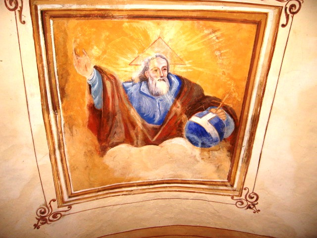 Pezzolo Valle Uzzone. Gorrino. Cappella di San Sebastiano. IL soffitto con Dio Padre.